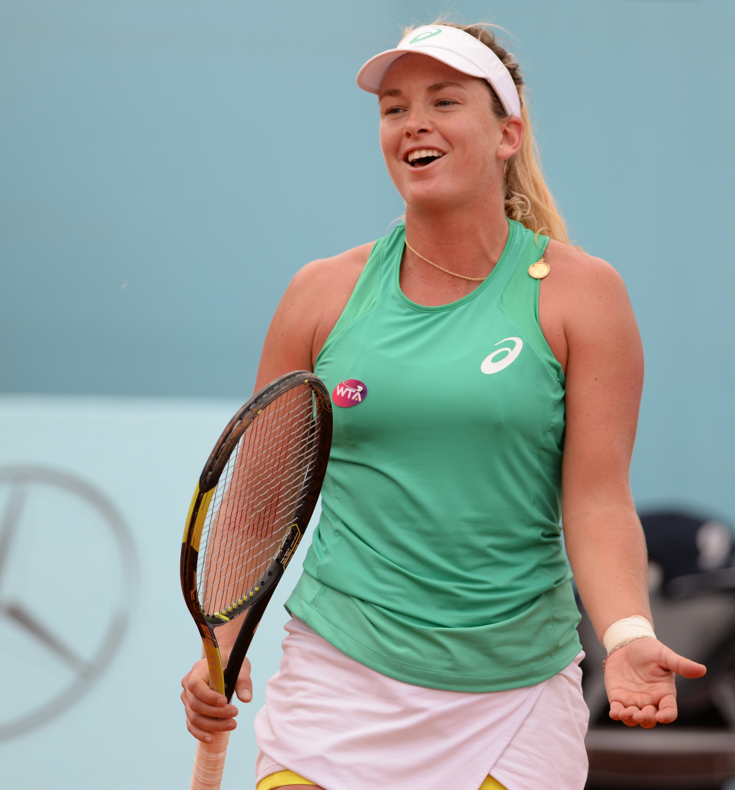 Coco Vandeweghe